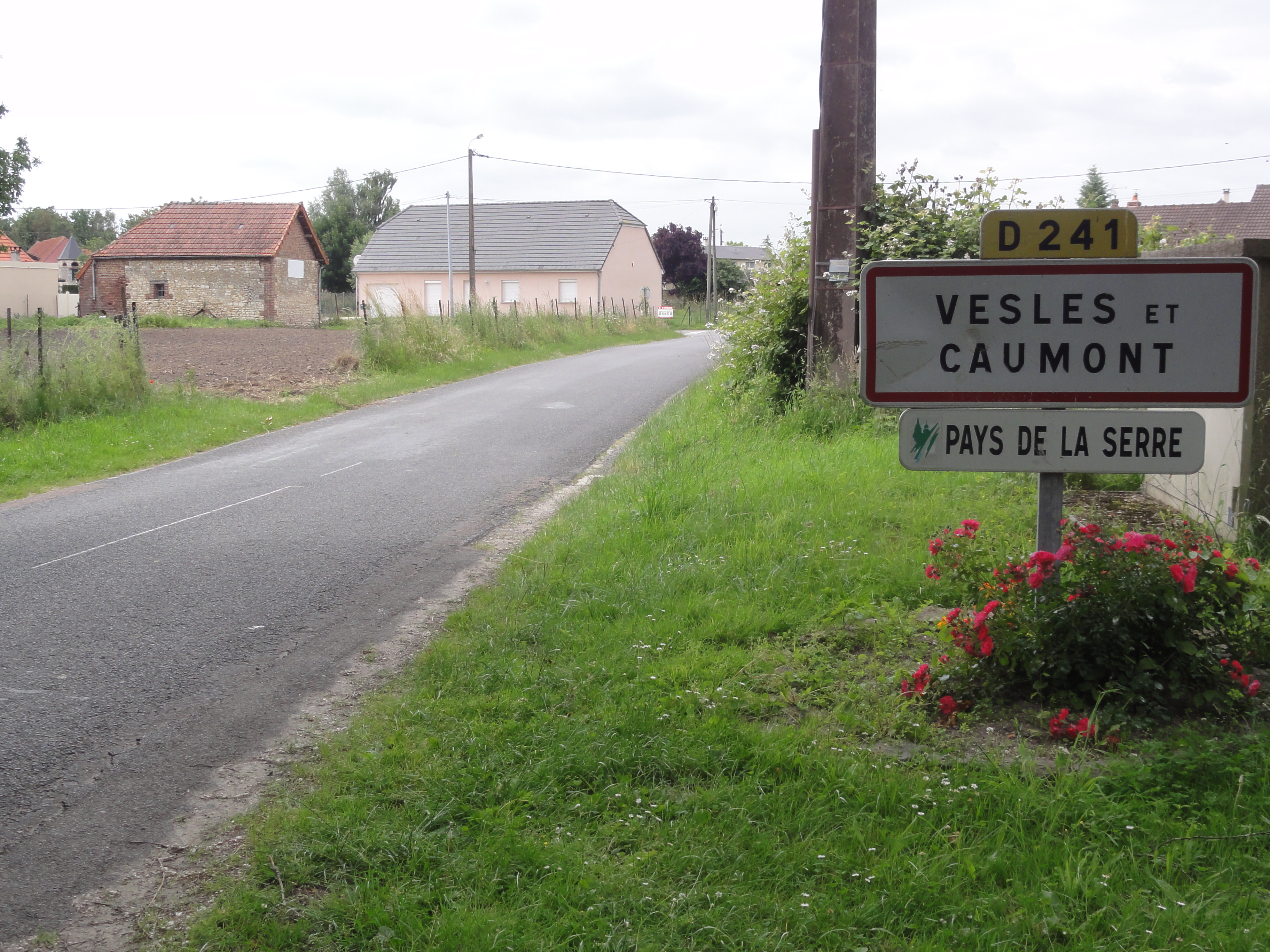 Vesles-et-Caumont (Aisne) city limit sign